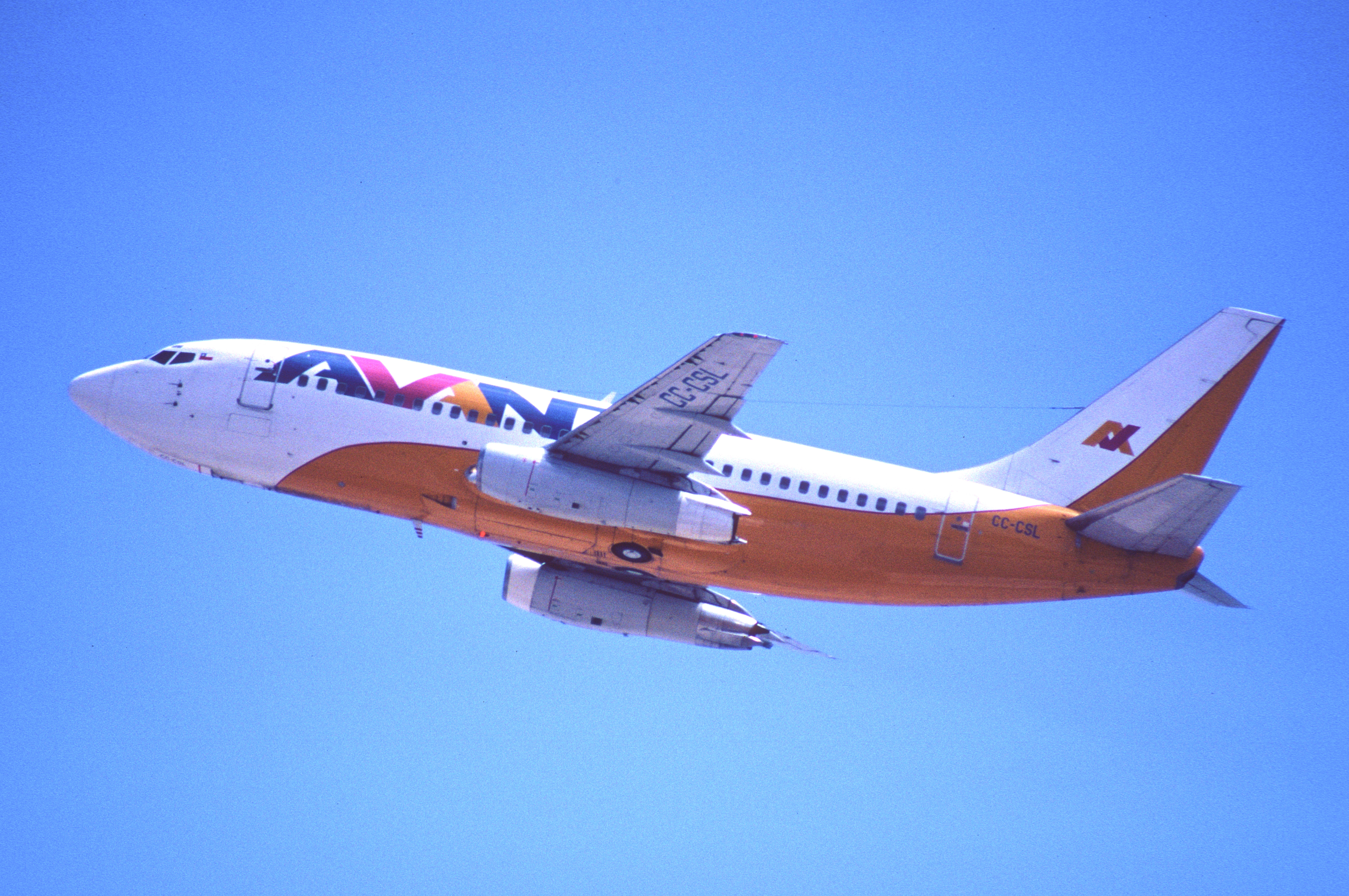 109am - Avant Airlines Boeing 737-248; CC-CSL@IQQ;14.09.2000